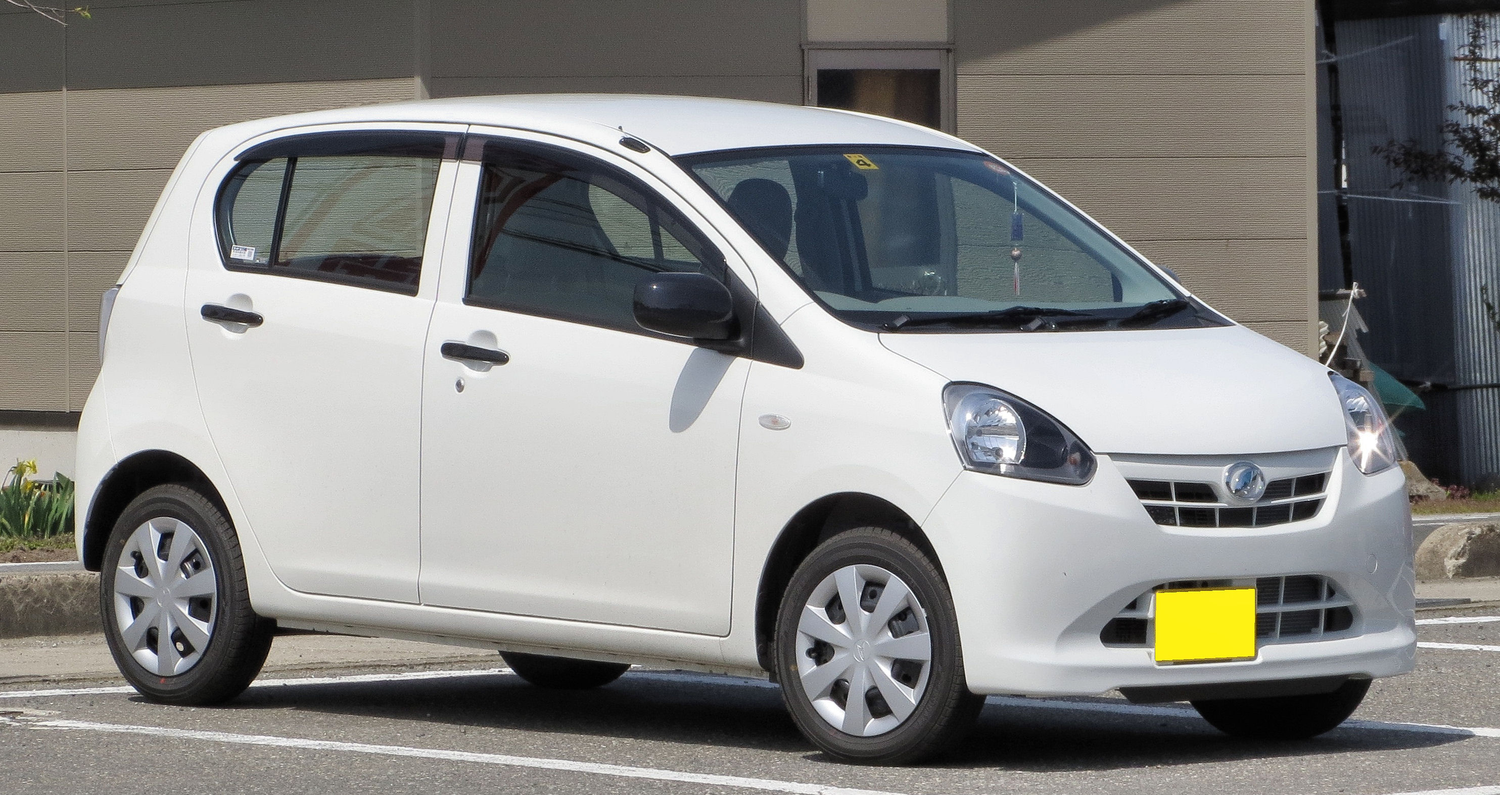 ダイハツミライースLf